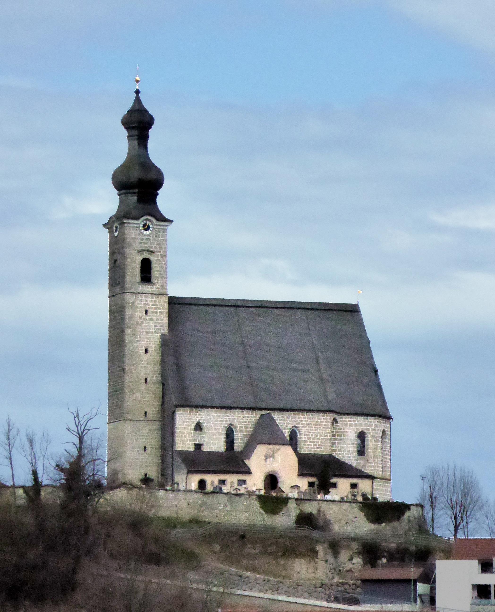 Boarisch: Anga im Beachtsgodna Land, d' Himmefahrtskiach vo Sidn xeng.